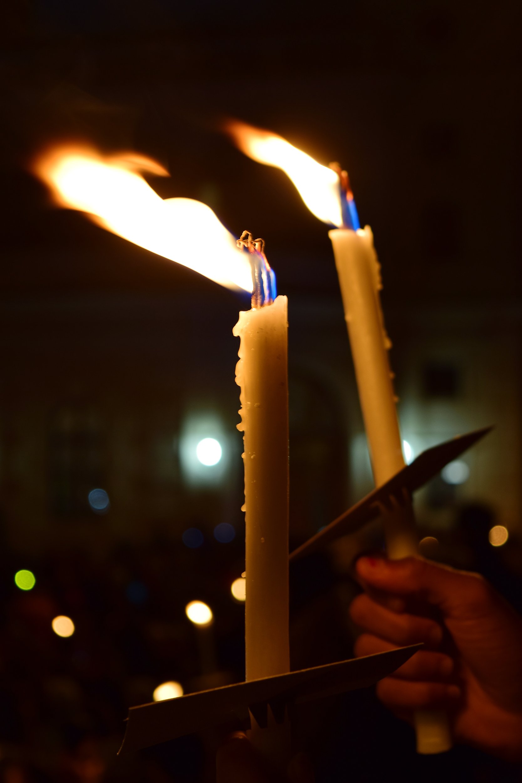 Lichterkette "Unsere Ministerien nicht in die Hände von Rechtsextremen!"